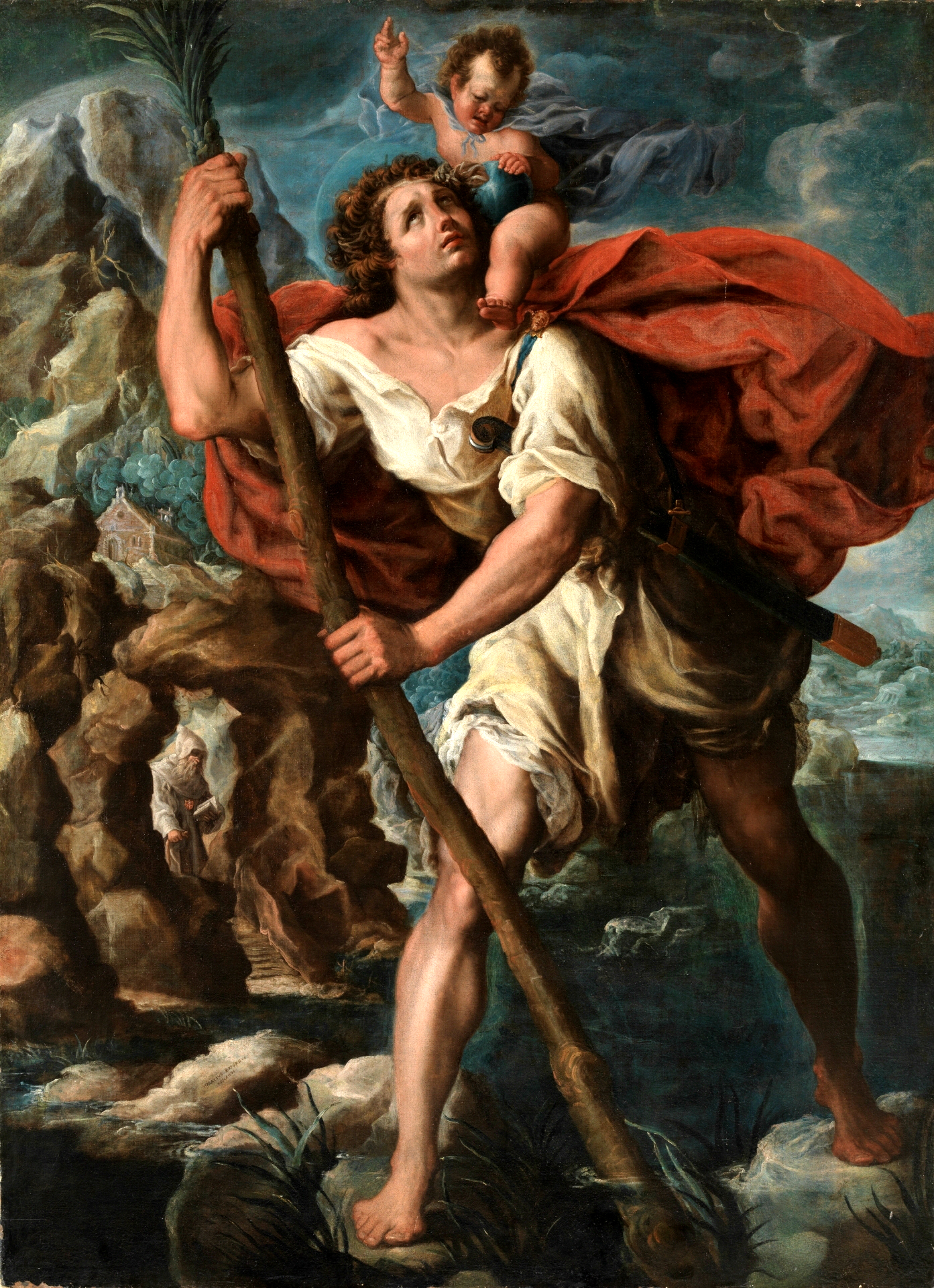 La obra representa a San Cristóbal llevando al Niño Jesús.